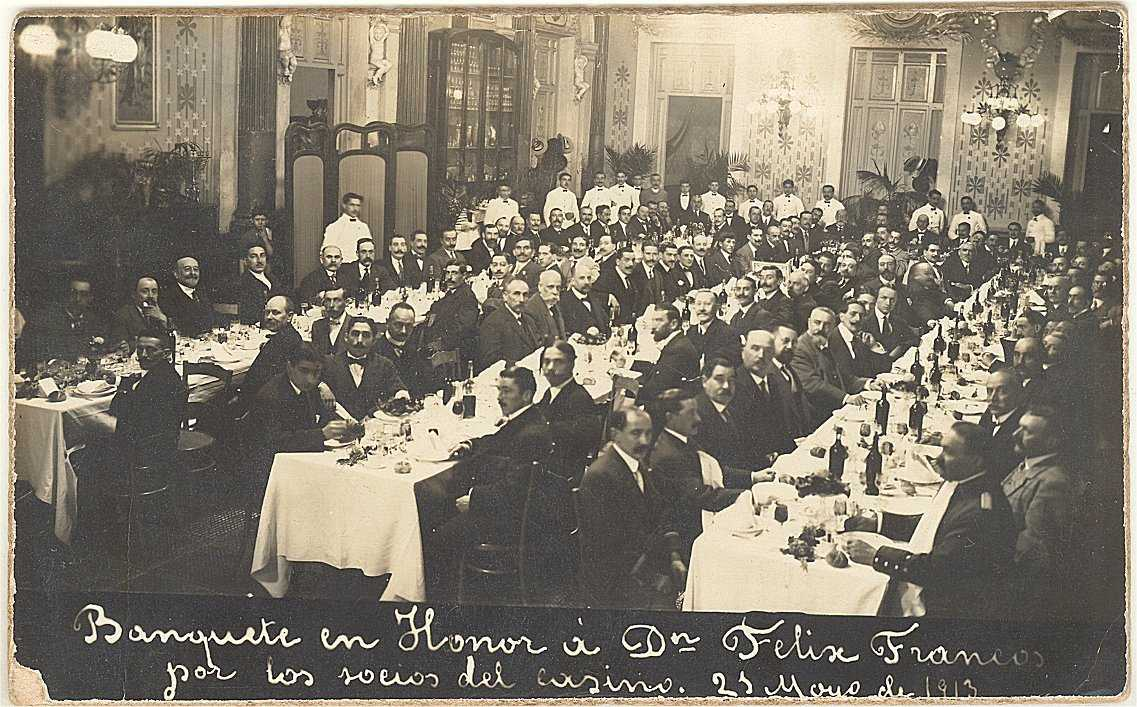 Fotografia scattata in occasione della cena tenutasi nei saloni dell'Hotel Mundial Palace di Barcellona, Spagna, data in onore di Felix Francos Garcia, industriale e primo presidente del Centro Asturiano di Barcellona. Fonte della notizia: Mundo Grafico 11.6.1913 pag.7